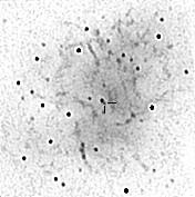 Pulsar (marked) in Crab Nebula (M1)